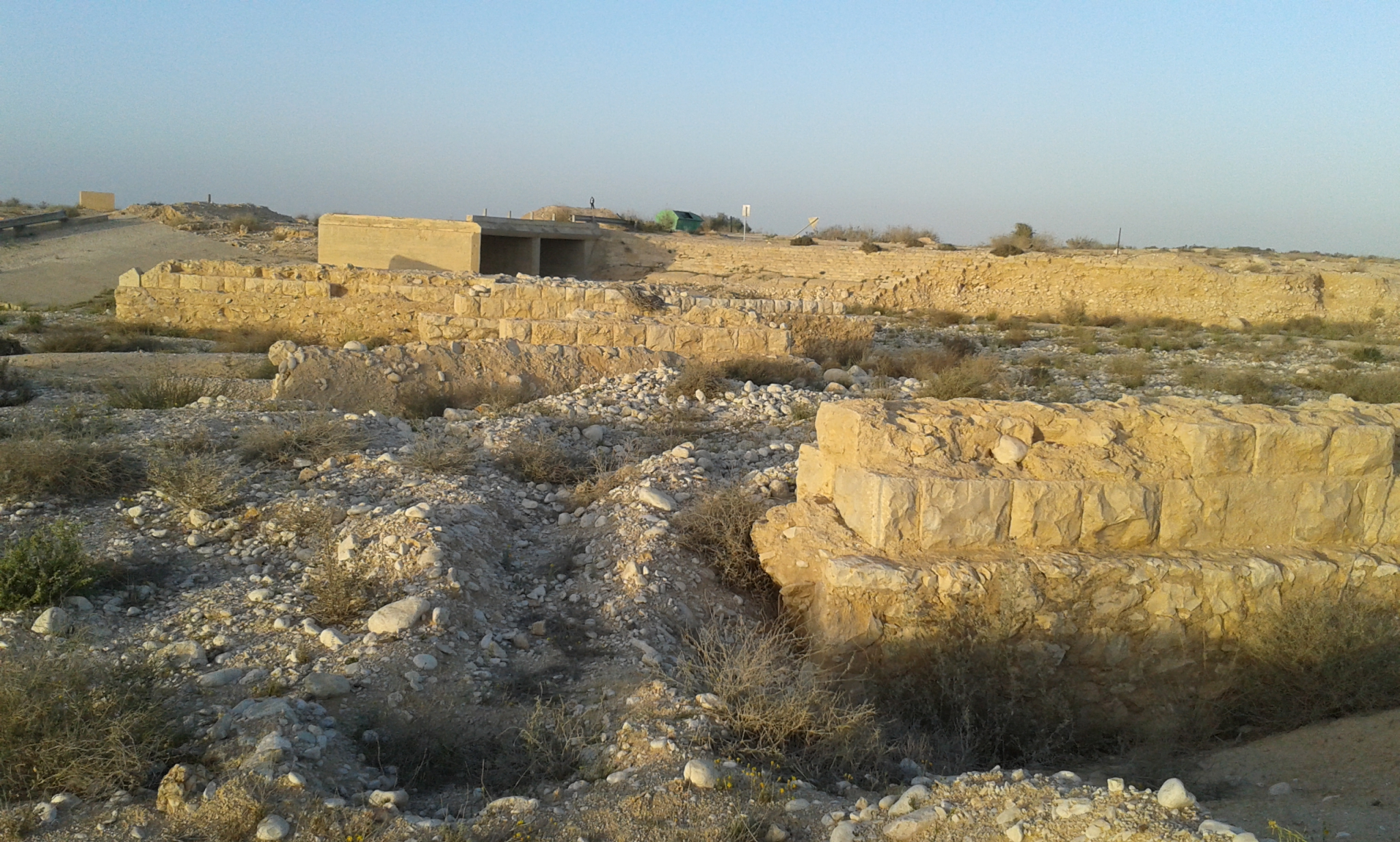 גשר הרכבת הטורקי והבריטי בניצנה